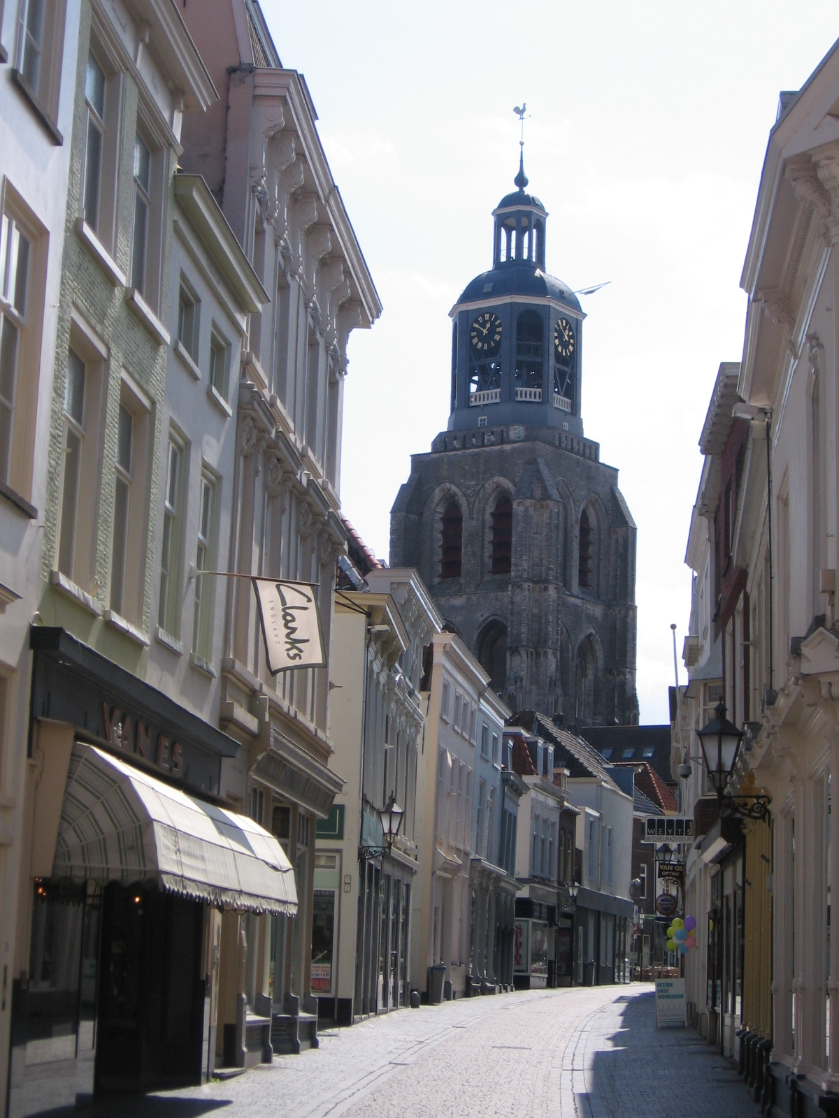 Bergen op Zoom, 17 april 2006